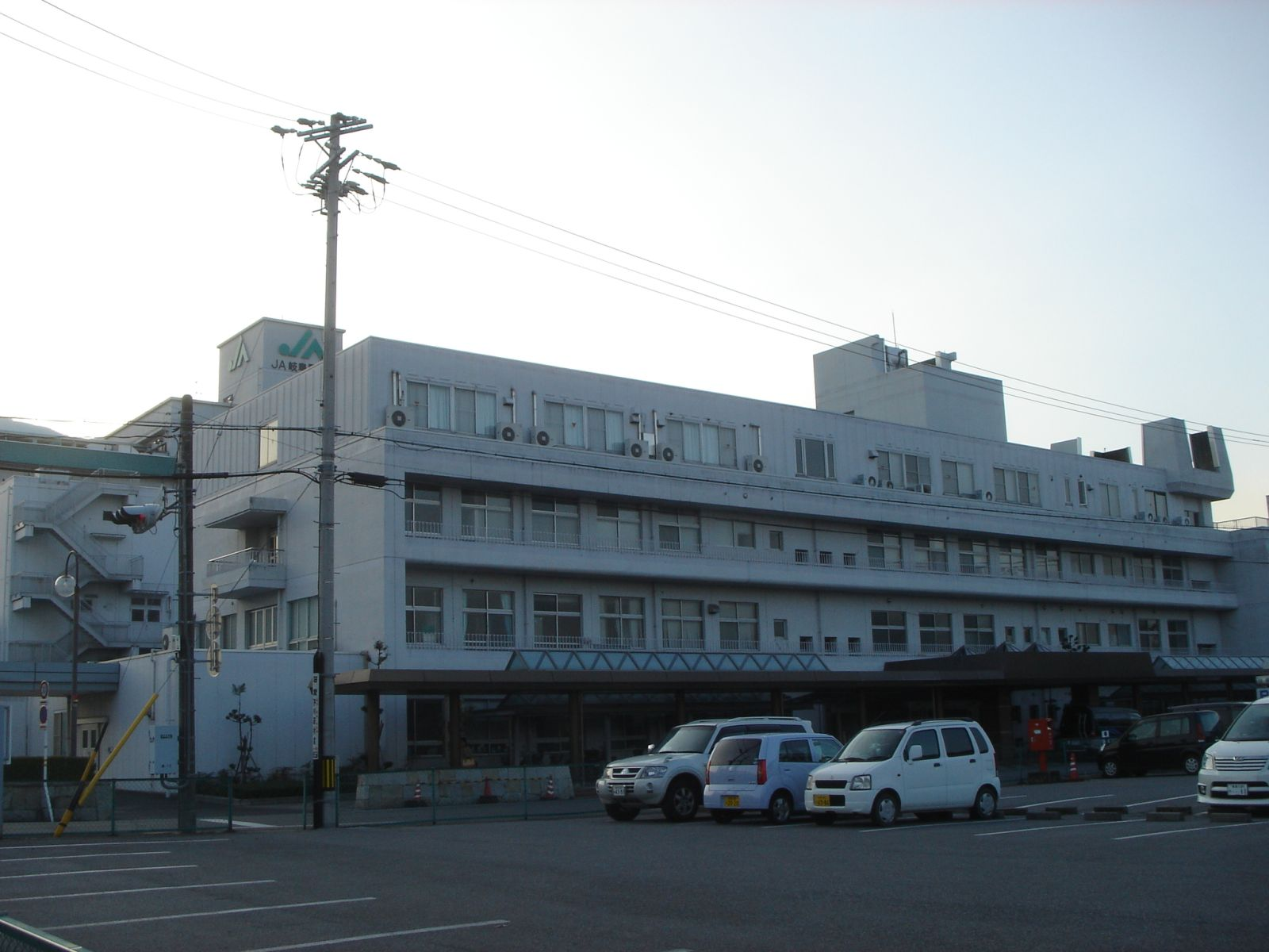 Nishi-Mino Kosei Hospital（西美濃厚生病院）,Yoro,Gifu,Japan(岐阜県養老町)で撮影。